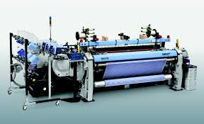 Macchina Itema